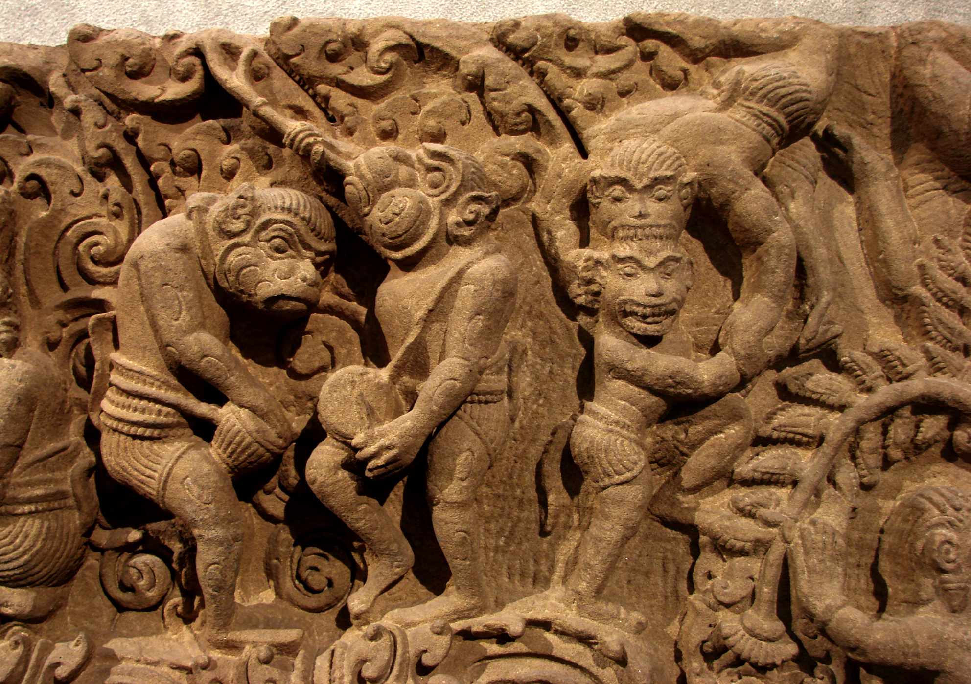 Linteau représentant un épisode du Ramayana: ici, combat des singes. (détail: il ne s'agit pas de Sugriva et de Valin.) Cambodge, province de Battambang, Vat Baset, style du Baphuon, 11ème siècle. Grès.Musée Guimet, Paris.